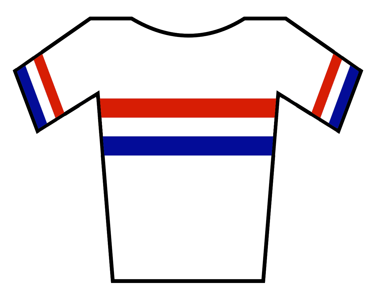 Maillot del Reino Unido